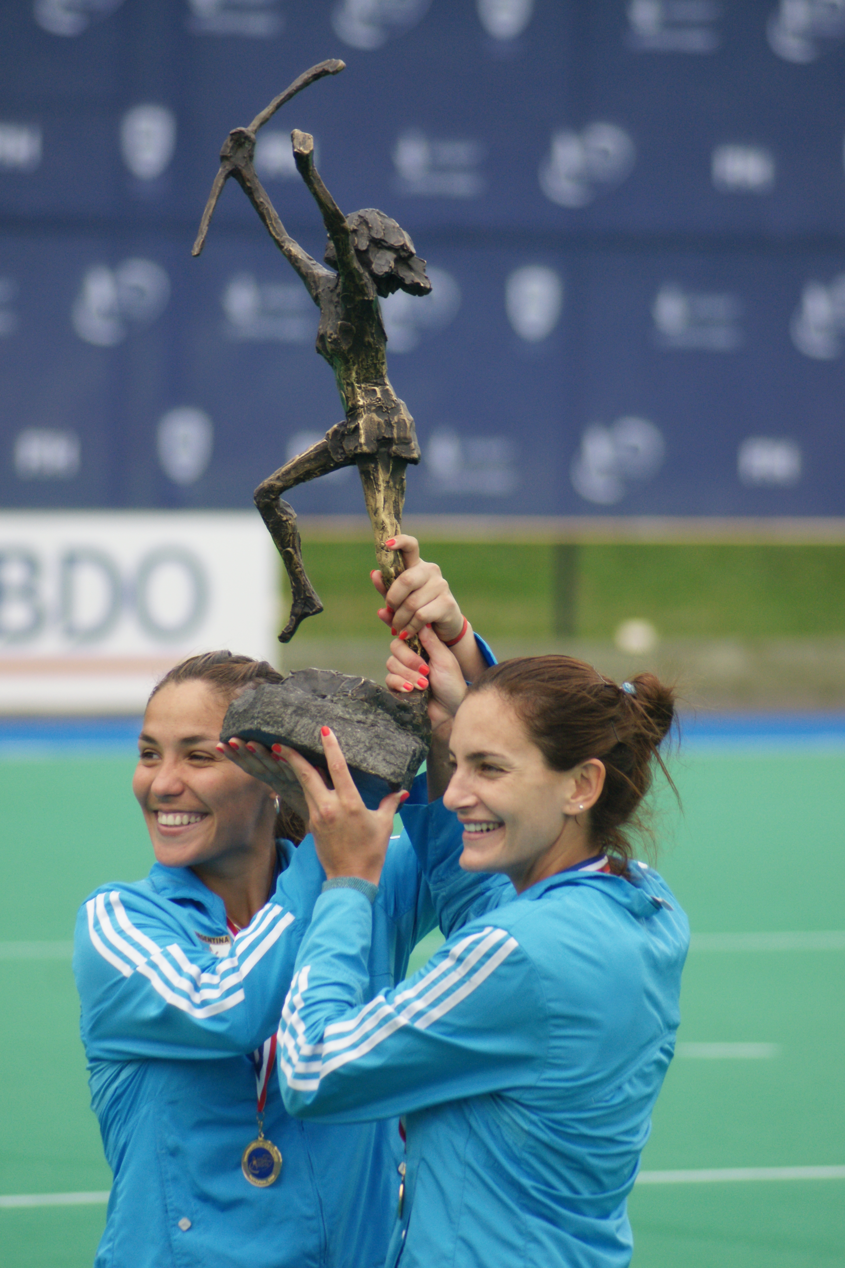 Luciana Aymar y Soledad García levantan el troeo después de ganarle a Holanda en el Mundial de Hockey sobre pasto de Rosario 2010.